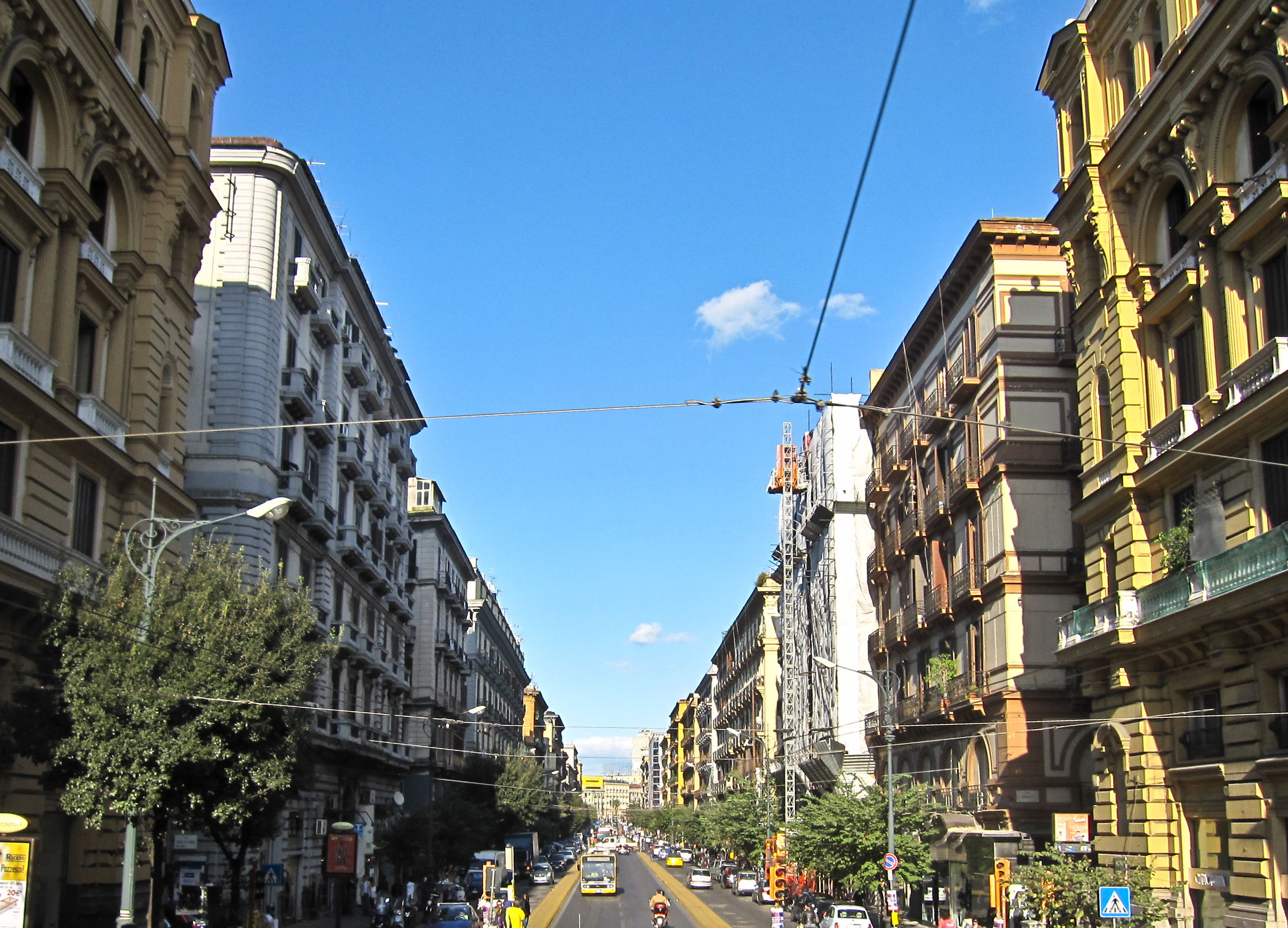 Detto anche Rettifilo. Questo è il tratto che va da Piazza Nicola Amore verso Piazza Garibaldi. Corso Umberto I, Napoli.